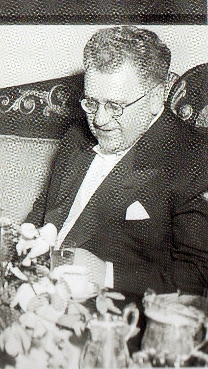 Neuvostoliittolainen diplomaatti Viktor Zaharovitš Lebedev (1900-1968) vuonna 1954.